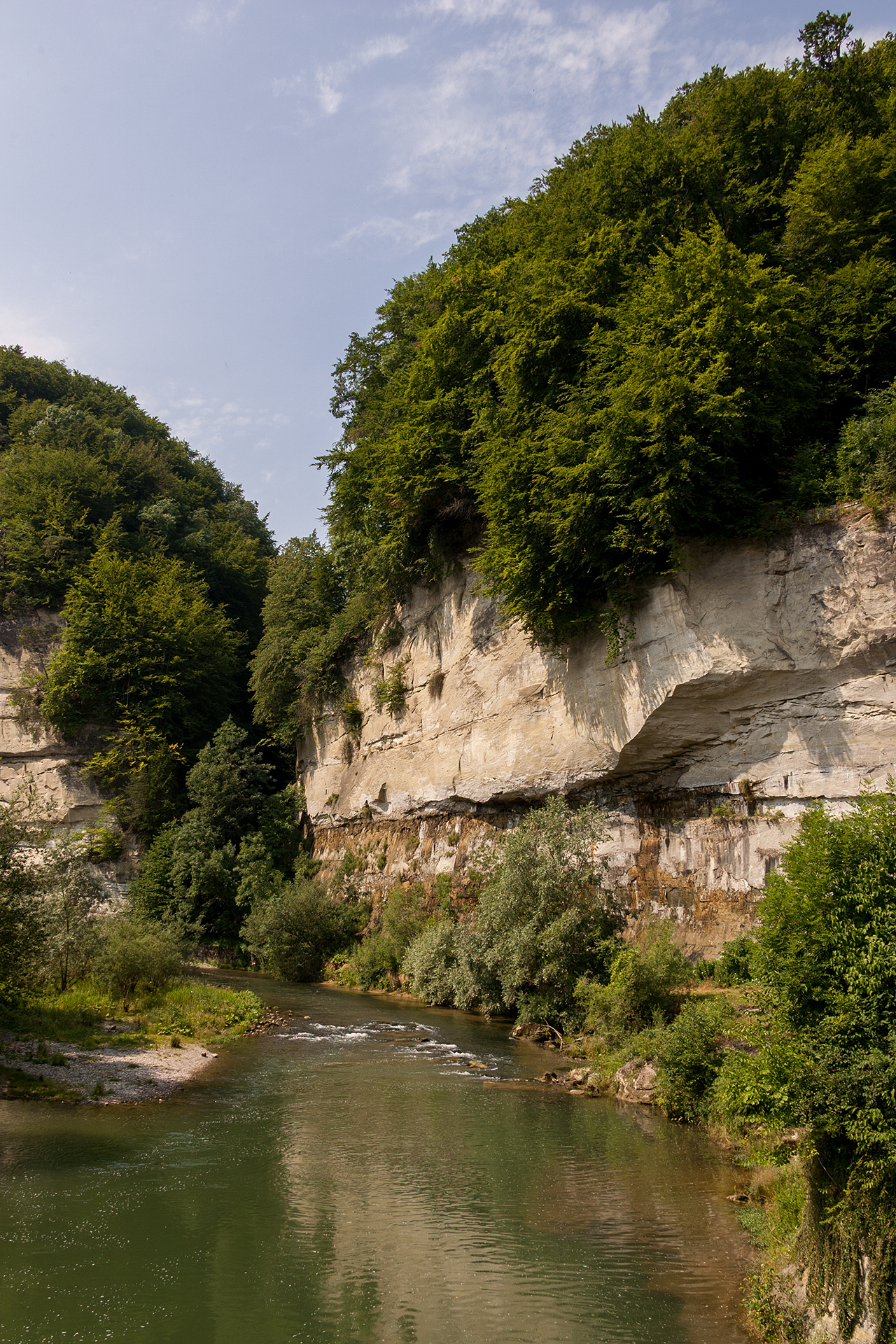 Saane zwischen Sandsteinfelsen in Fribourg